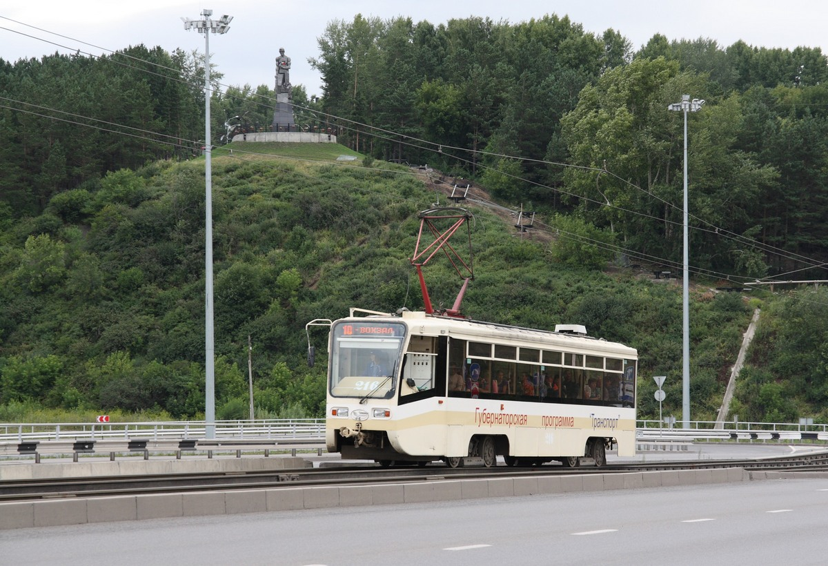 Трамвай. г. Кемерово